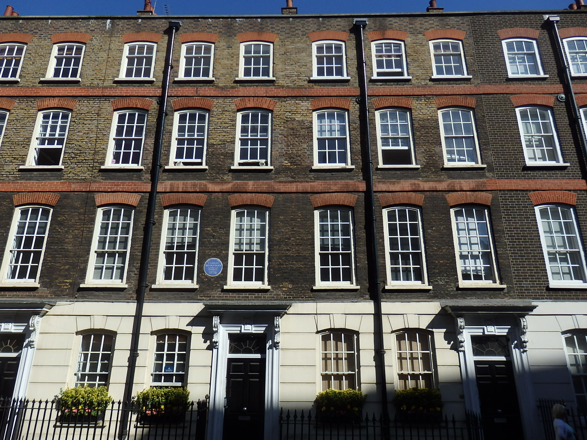 Platz von Bridgemans ehemaligen Haus in London, Soho